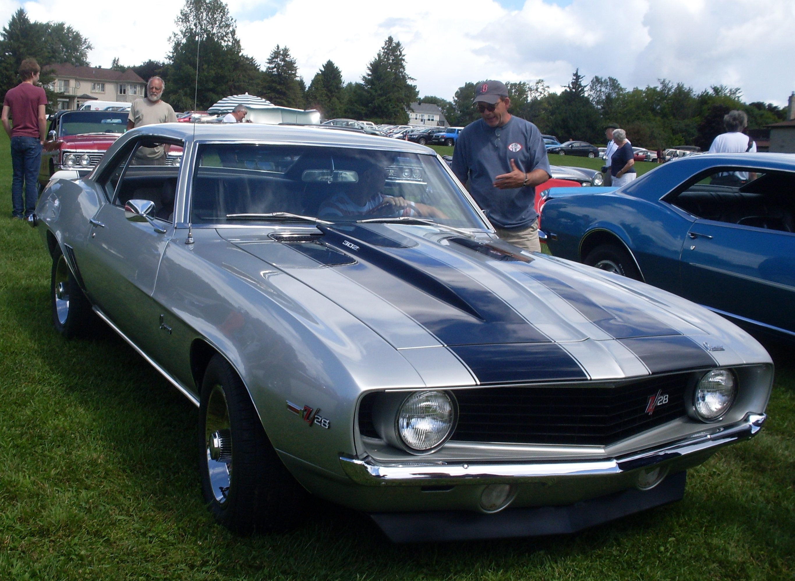 1969 Chevrolet Camaro Z28 photographed in Baie-D'Urfé, Quebec, Canada at Auto classique VAQ Baie-D'Urfé.